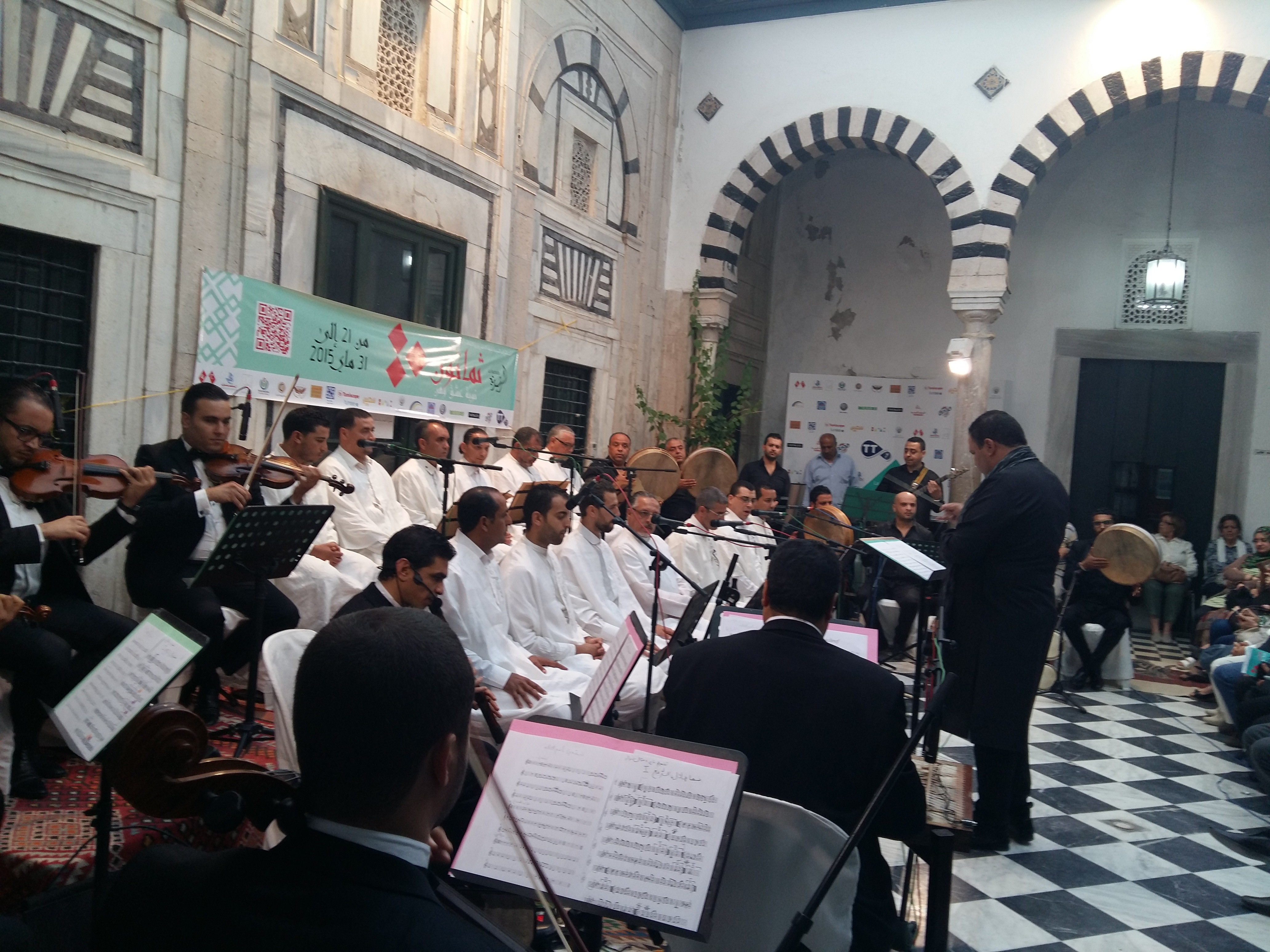 Rachidia Tunis This is an image of Cultural Fashion or Adornment from Tunisia